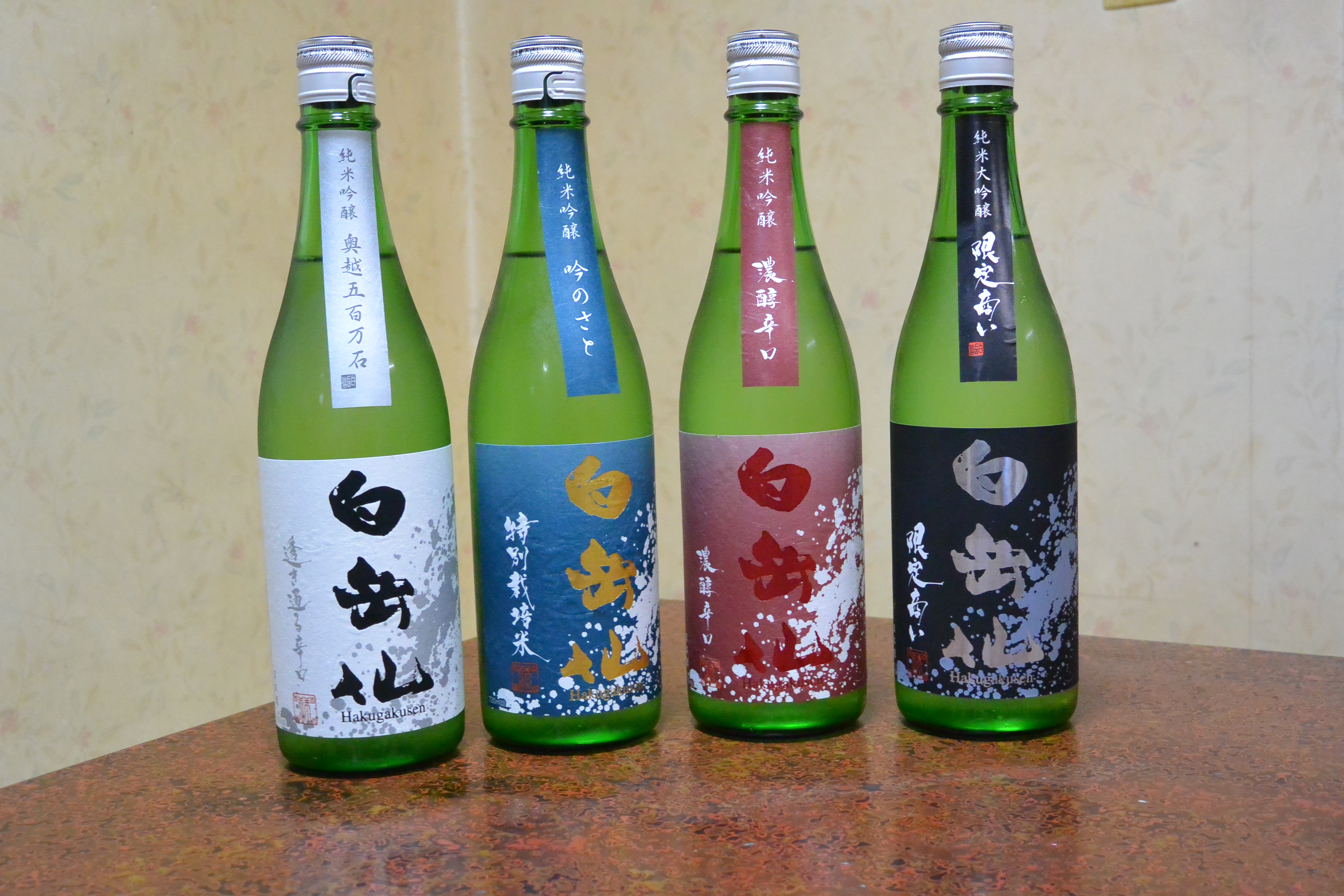 福井県の安本酒造の瓶